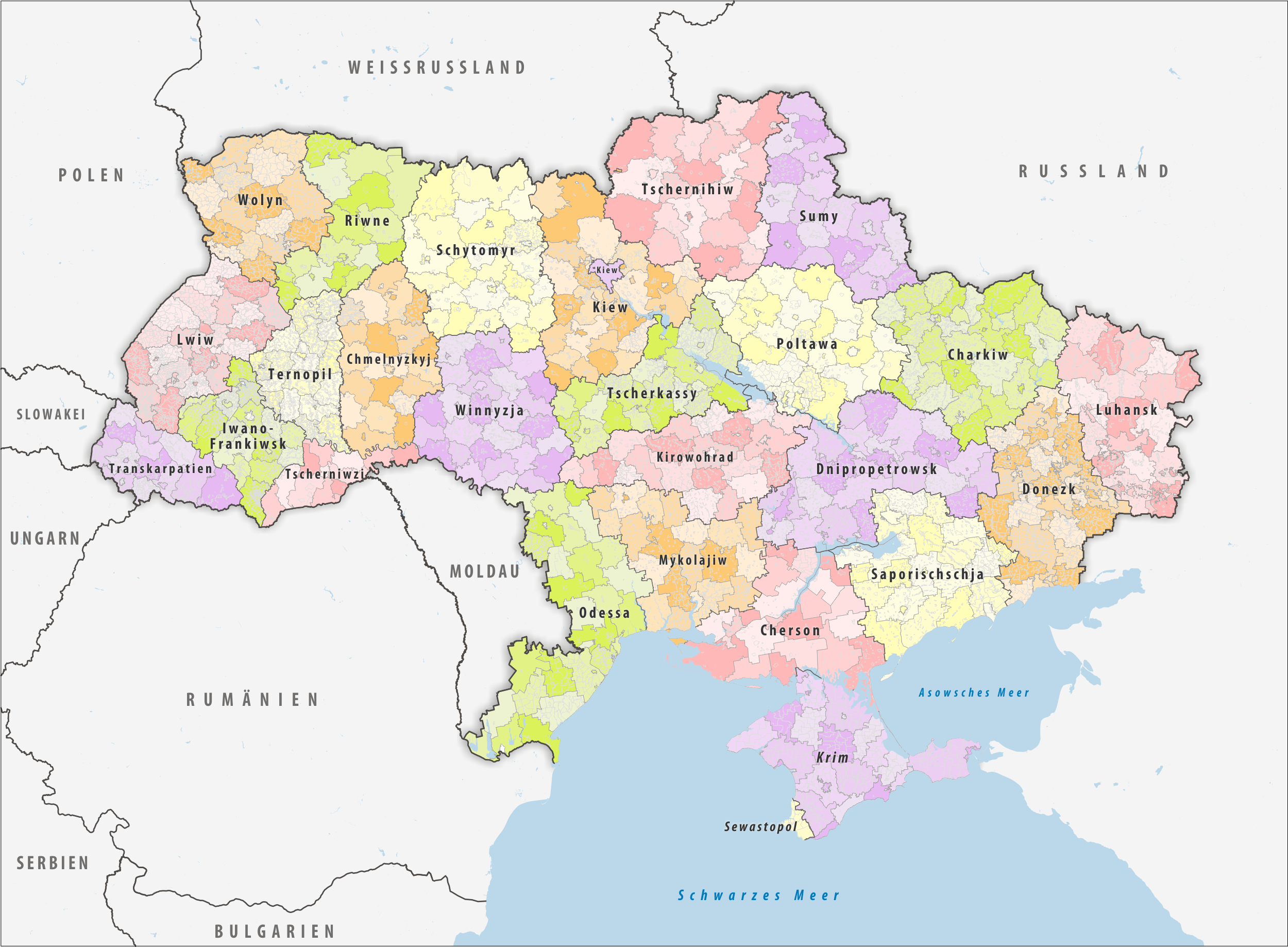 Administrative Gliederung der Ukraine